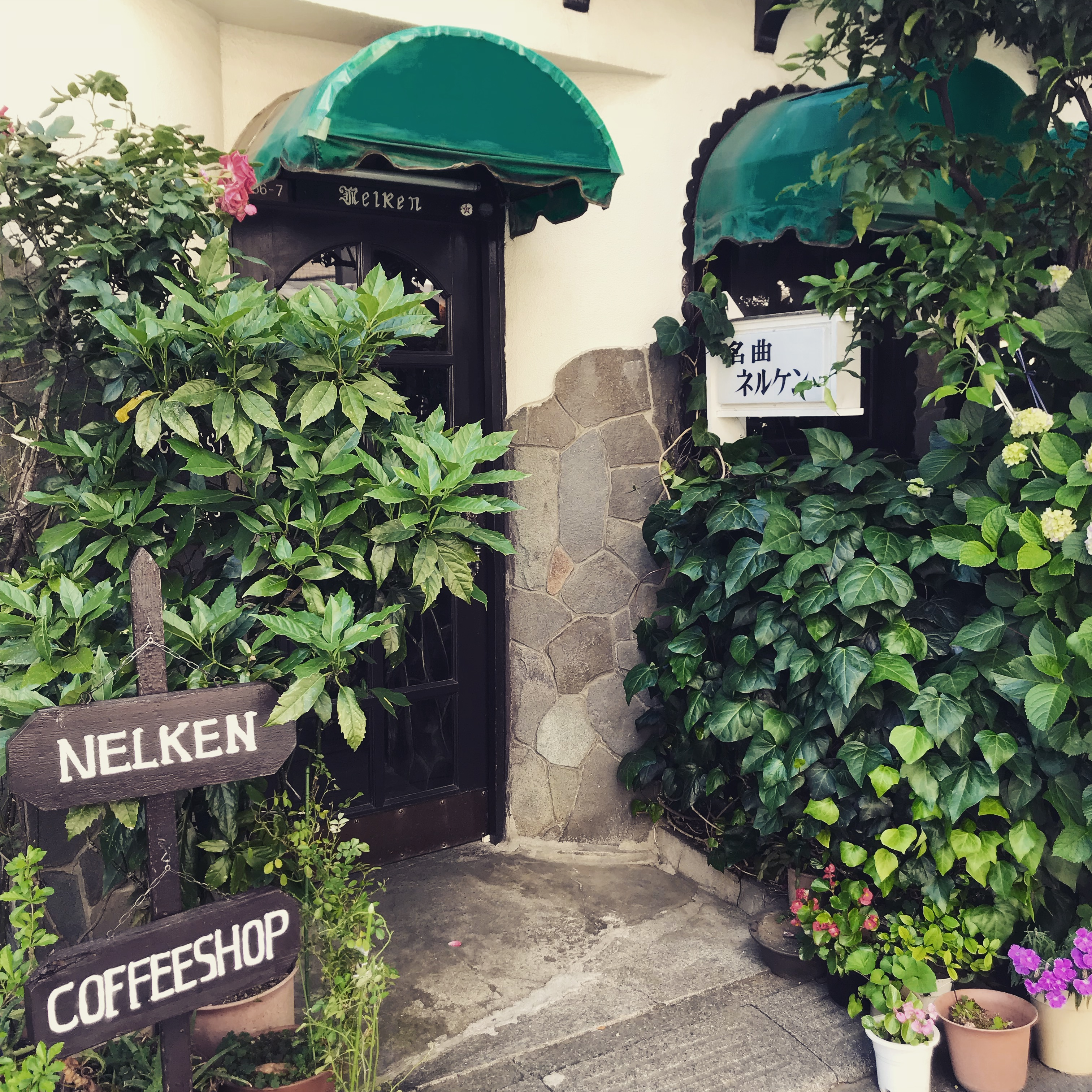 高円寺の名曲喫茶ネルケンの入口近影。緑に覆われている。